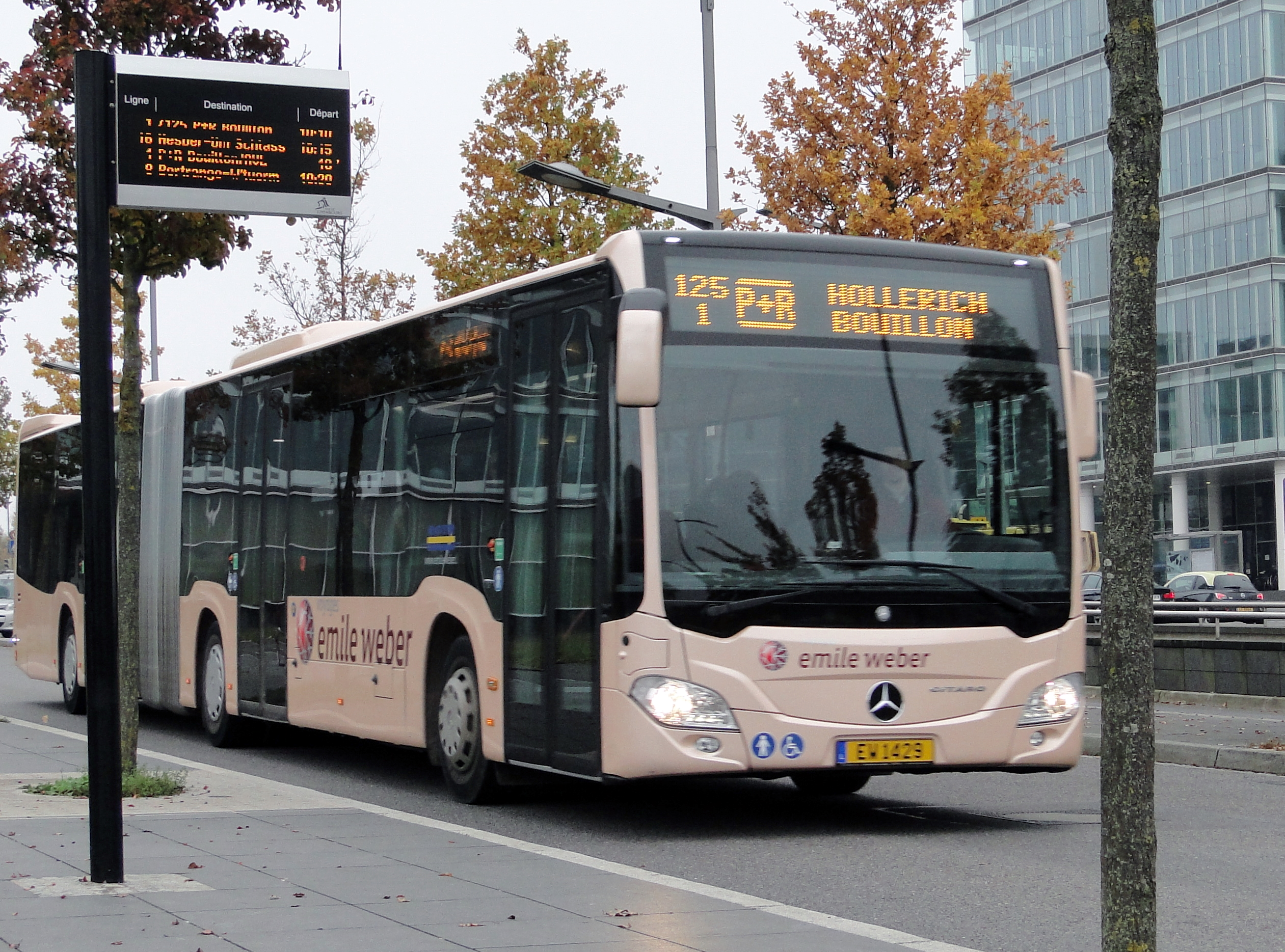 Bus Emile Weber sur la ligne combinée 1/125 à Kirchberg, av. John F. Kennedy